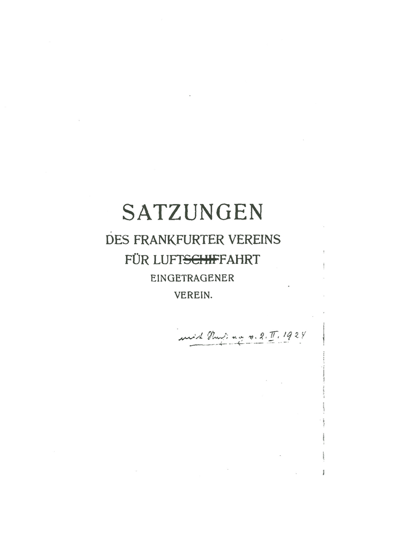 Vermerk der Namensänderung des Frankfurter Vereins für Luftfahrt beim Vereinsregister Frankfurt